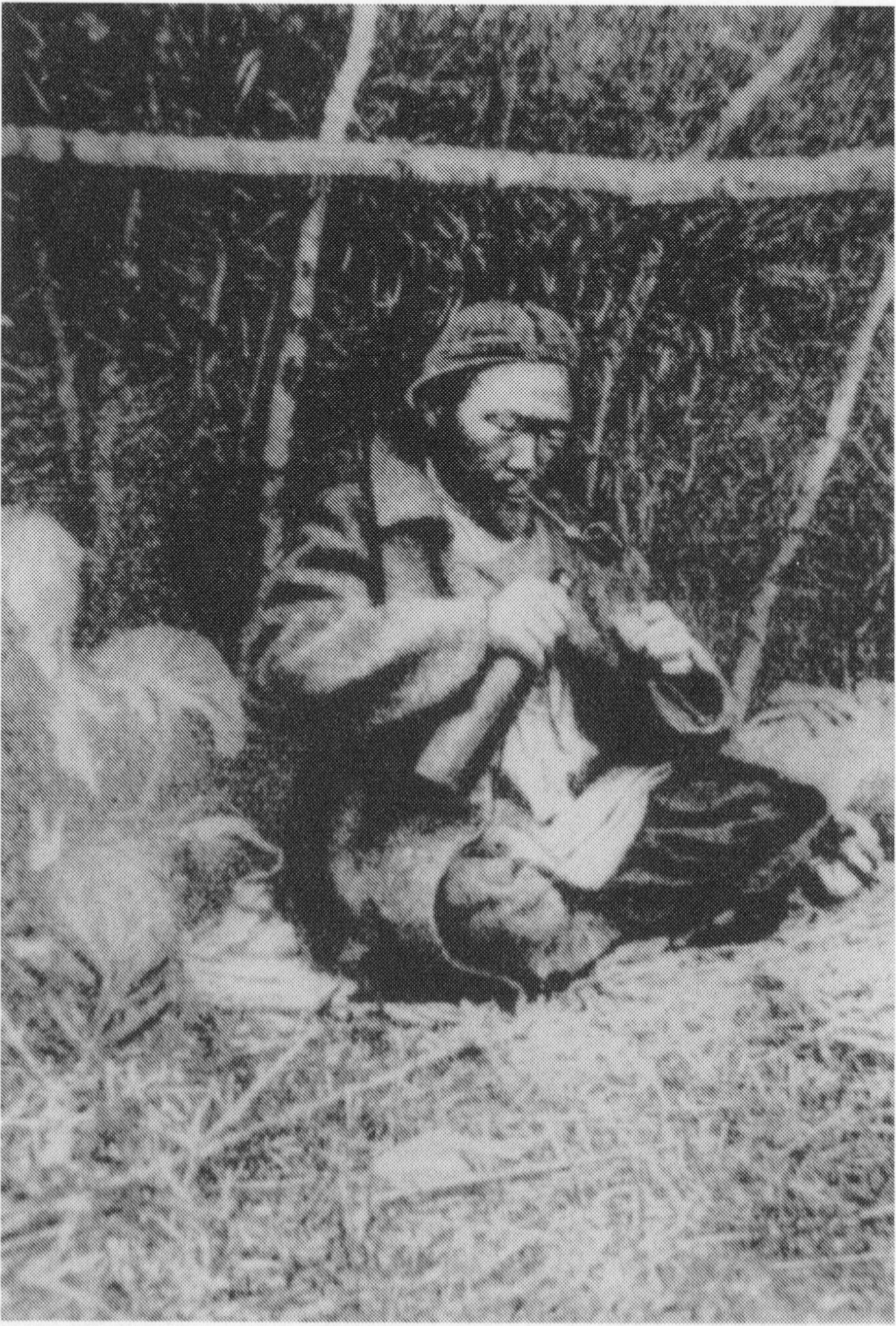 Дерсу Узала в экспедиции Владимира Клавдиевича Арсеньева. Редкая фотография.